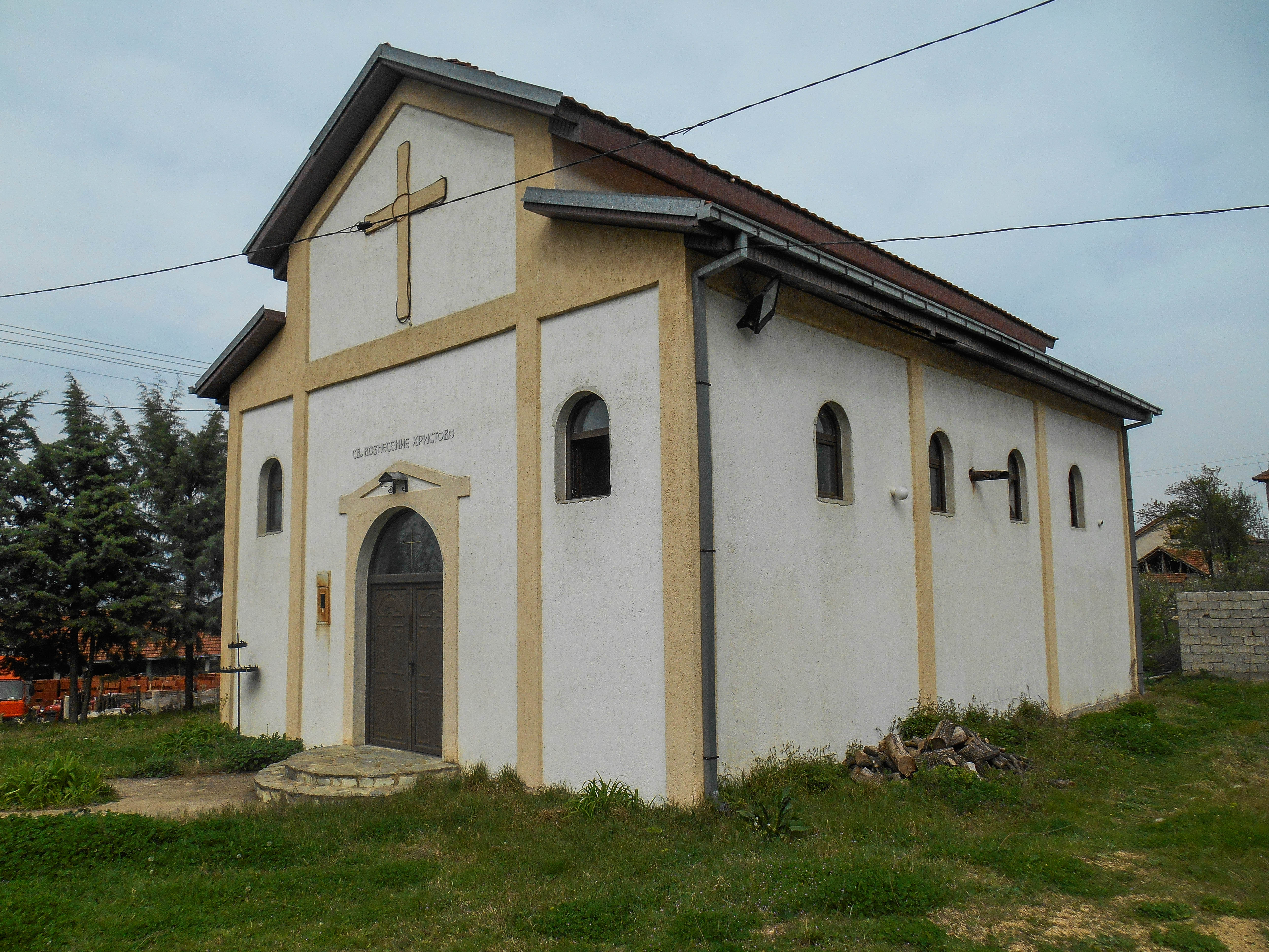 Црквата во Свидовица